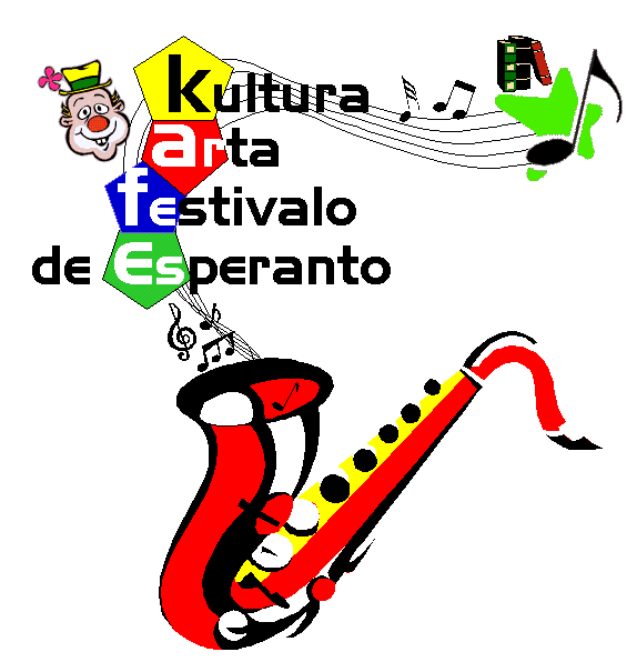 Reklambildo por la Kultura Arta Festivalo de Esperanto okazinta en Tuluzo en 2000